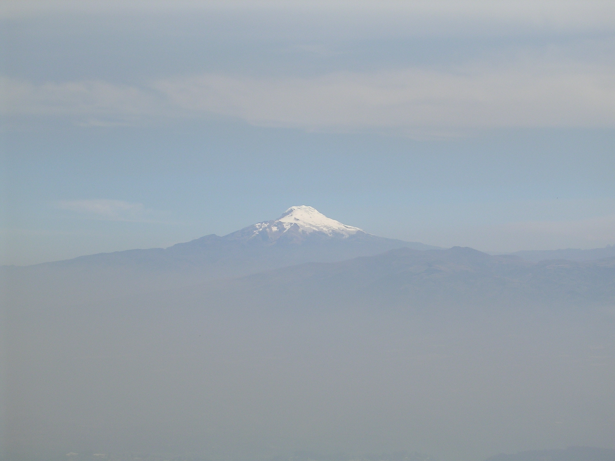 Cayambe volcano (Ecuador) from Pichincha's Cruz Loma